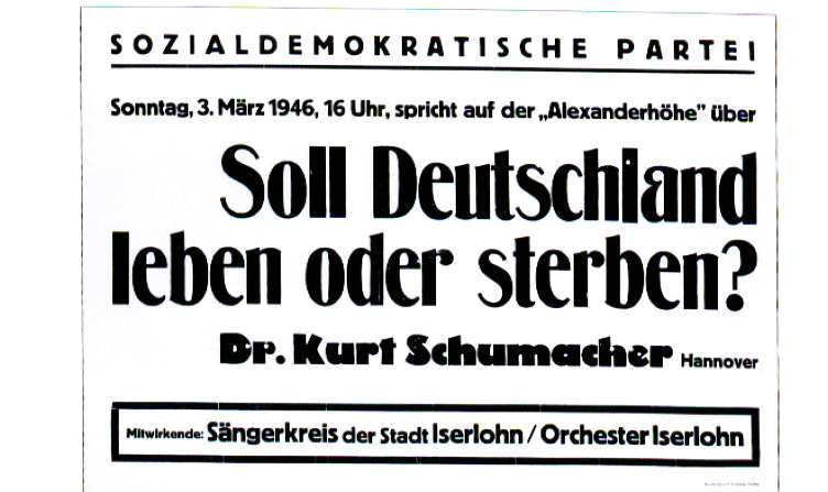 Kurt Schumacher spricht auf der Alexanderhöhe Iserlohn 1946